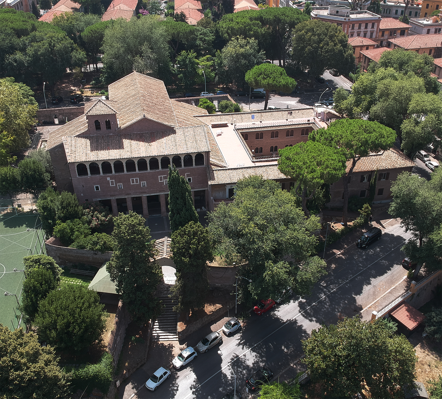 Foto aerea della basilica di San Saba